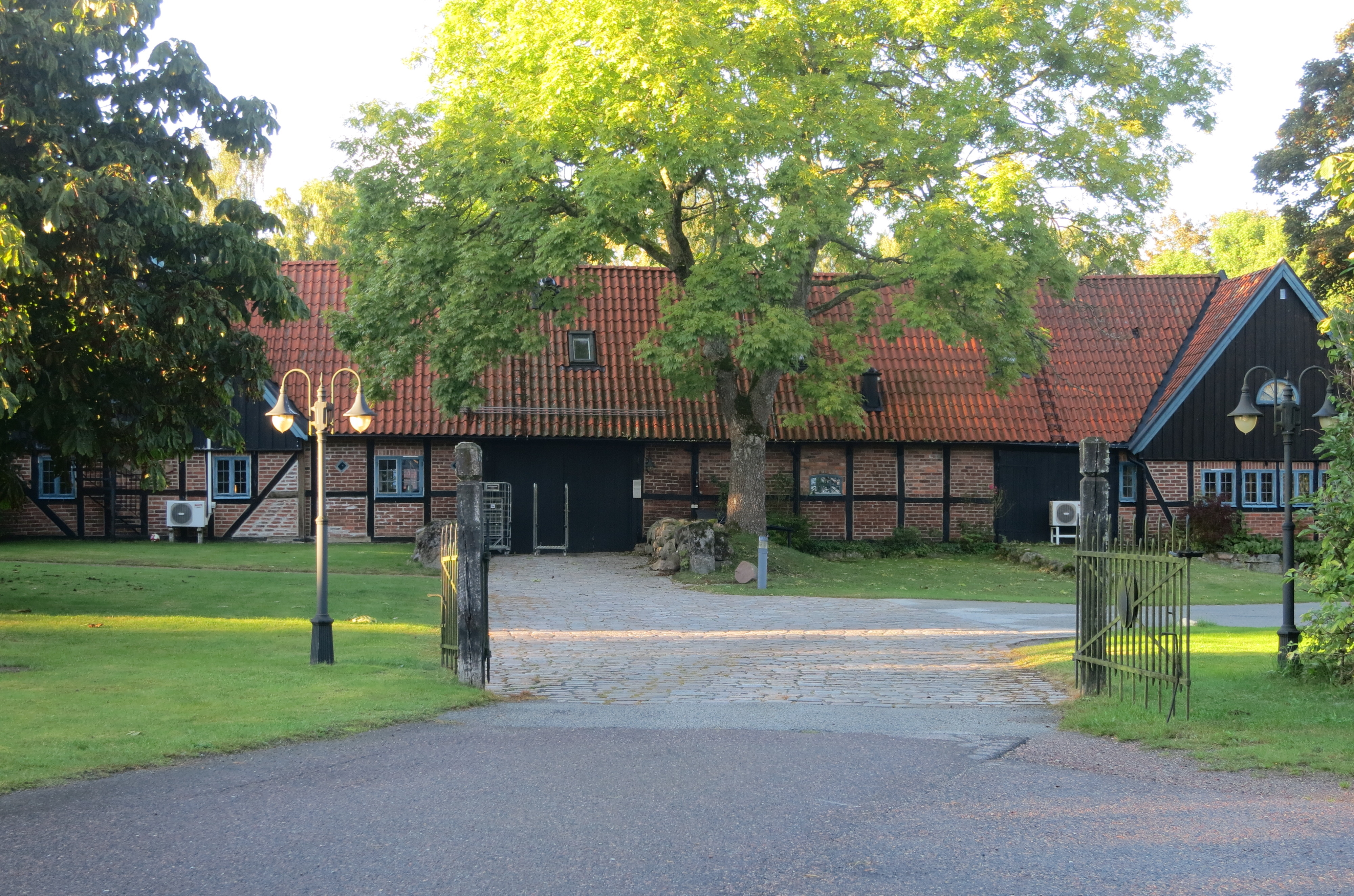 Nämndemansgården i Blentarp